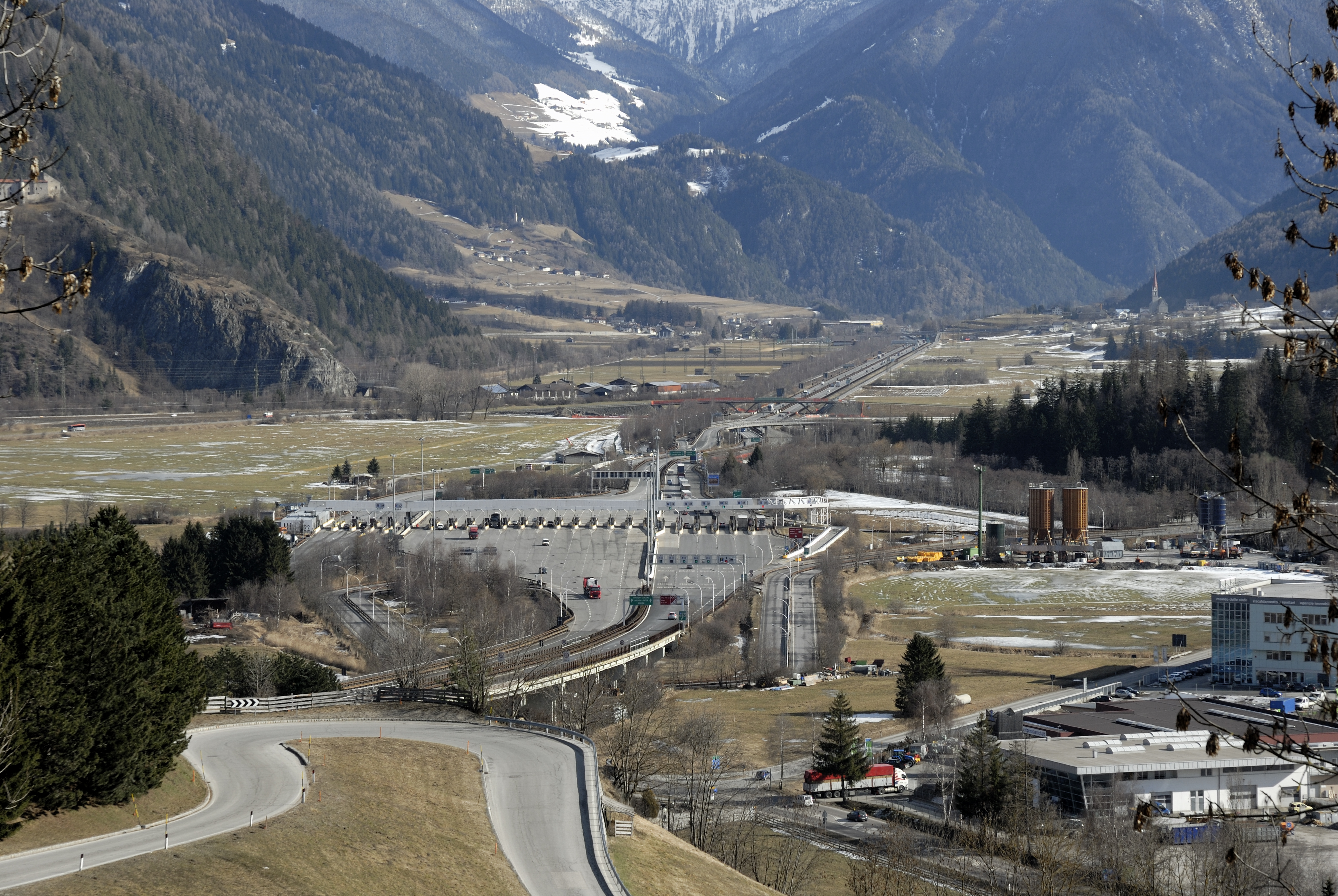 Mautstelle Sterzing der italiensischen Brennerautobahn A22